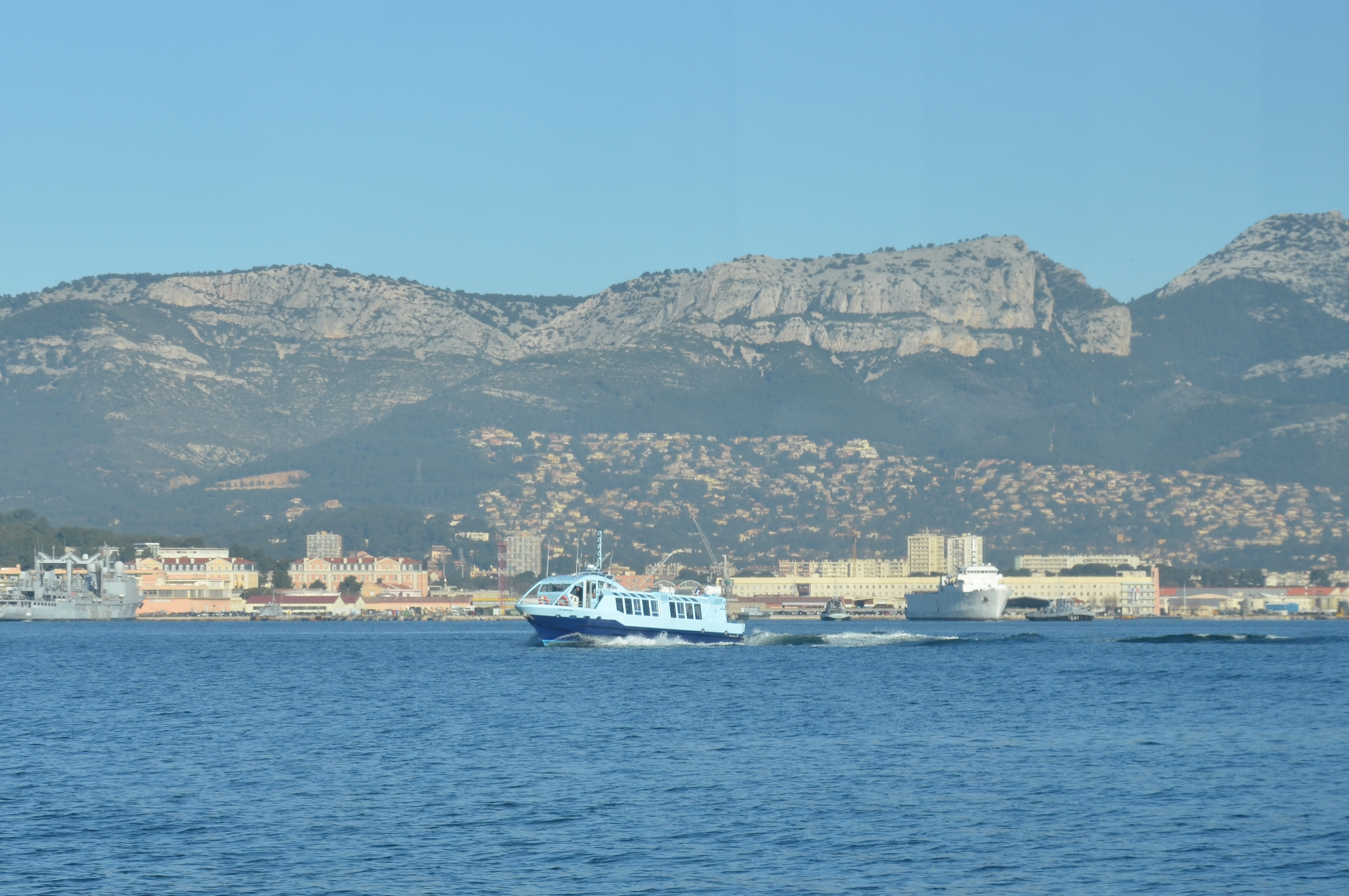 Bateau-Bus "Lou Roucaou" du réseau Mistral, dans la baie de Petite Rade, à Toulon.